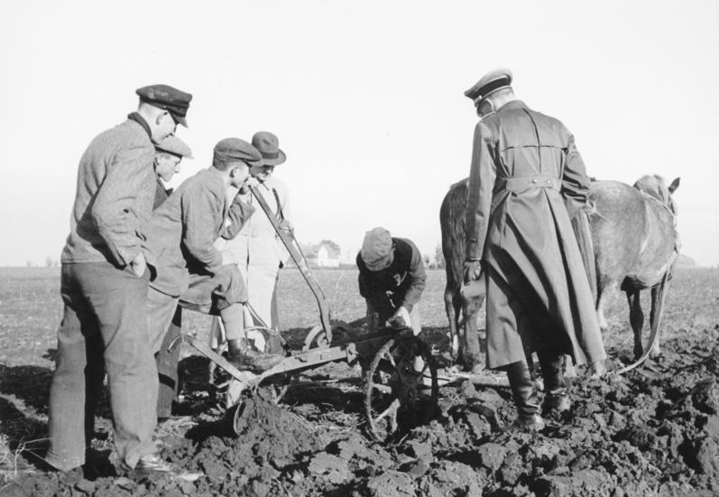 Wartheland, Lehrlinge bei Feldarbeit Der Landarbeitslehrling im Wartheland muss nach Ablauf zweier Jahre beweisen, dass er die Grundbegriffe und grundlegenden Arbeiten eines deutschen Bauern erlernt hat. Nur wer sich als überdurchschnittlich tüchtig und strebsam erwiesen hat, kann zu einem Bestandteil des lebendigen deutschen Ostwalls werden. 1940 [Reichsgau Wartheland.- Ausbildung von Lehrlingen in der Landwirtschaft]